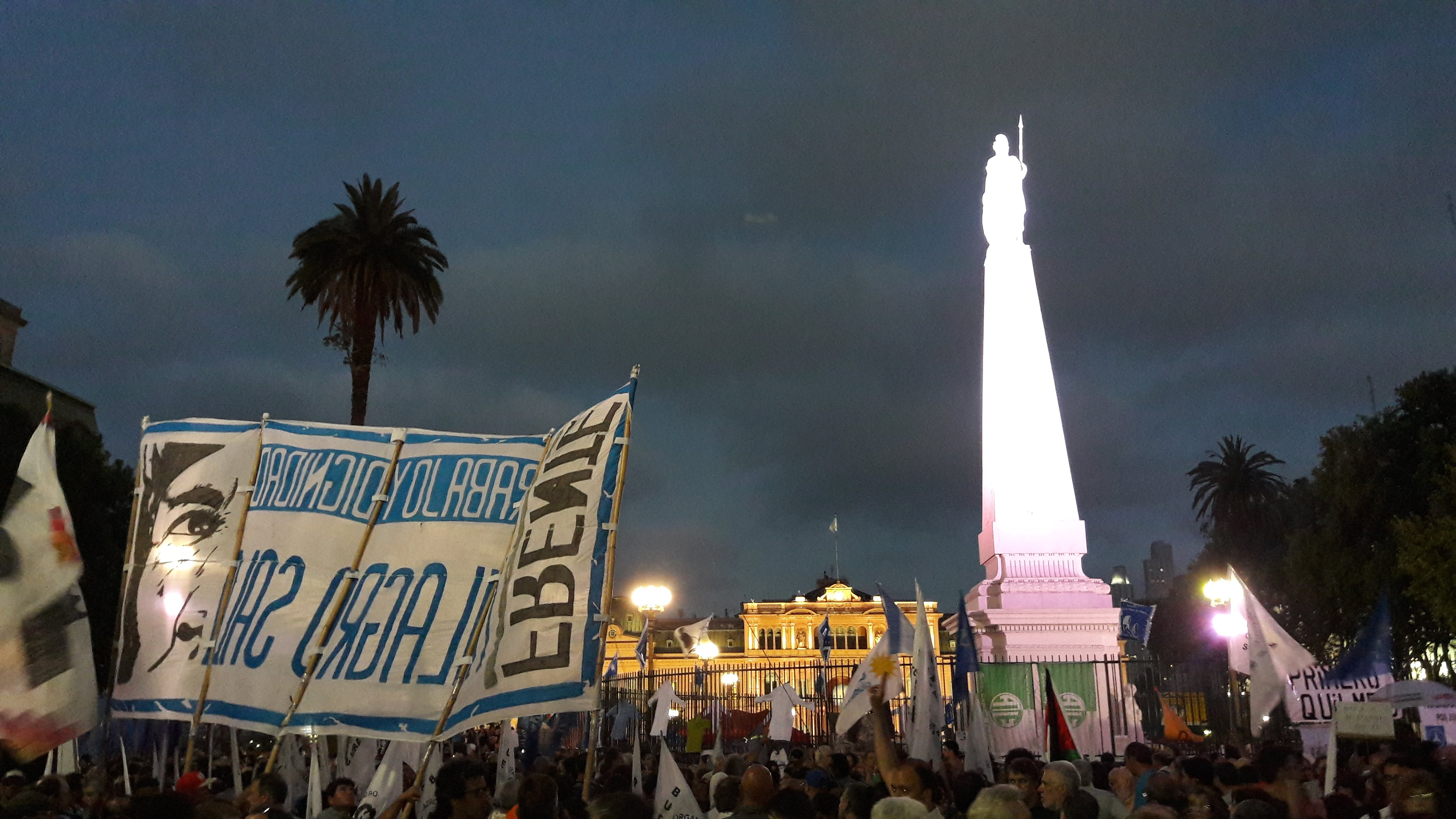 Marcha de la Resistencia, Plaza de Mayo, Buenos Aires, Argentina.